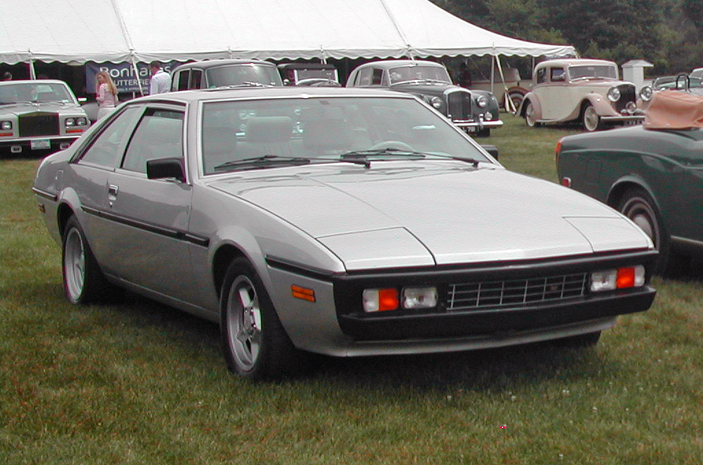 Bitter SC. Bewerking van nl::Afbeelding:BitterSC and Corniche.JPG. Eigen werk, vrij voor het publiek.